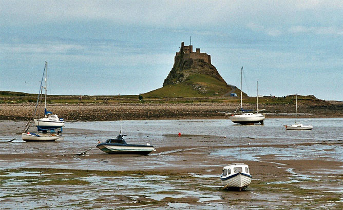 Lindisfarne slott.